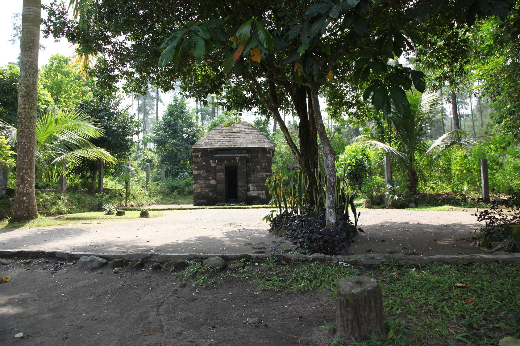 Candi Wringin Branjang (Wringin Branjang Temple)